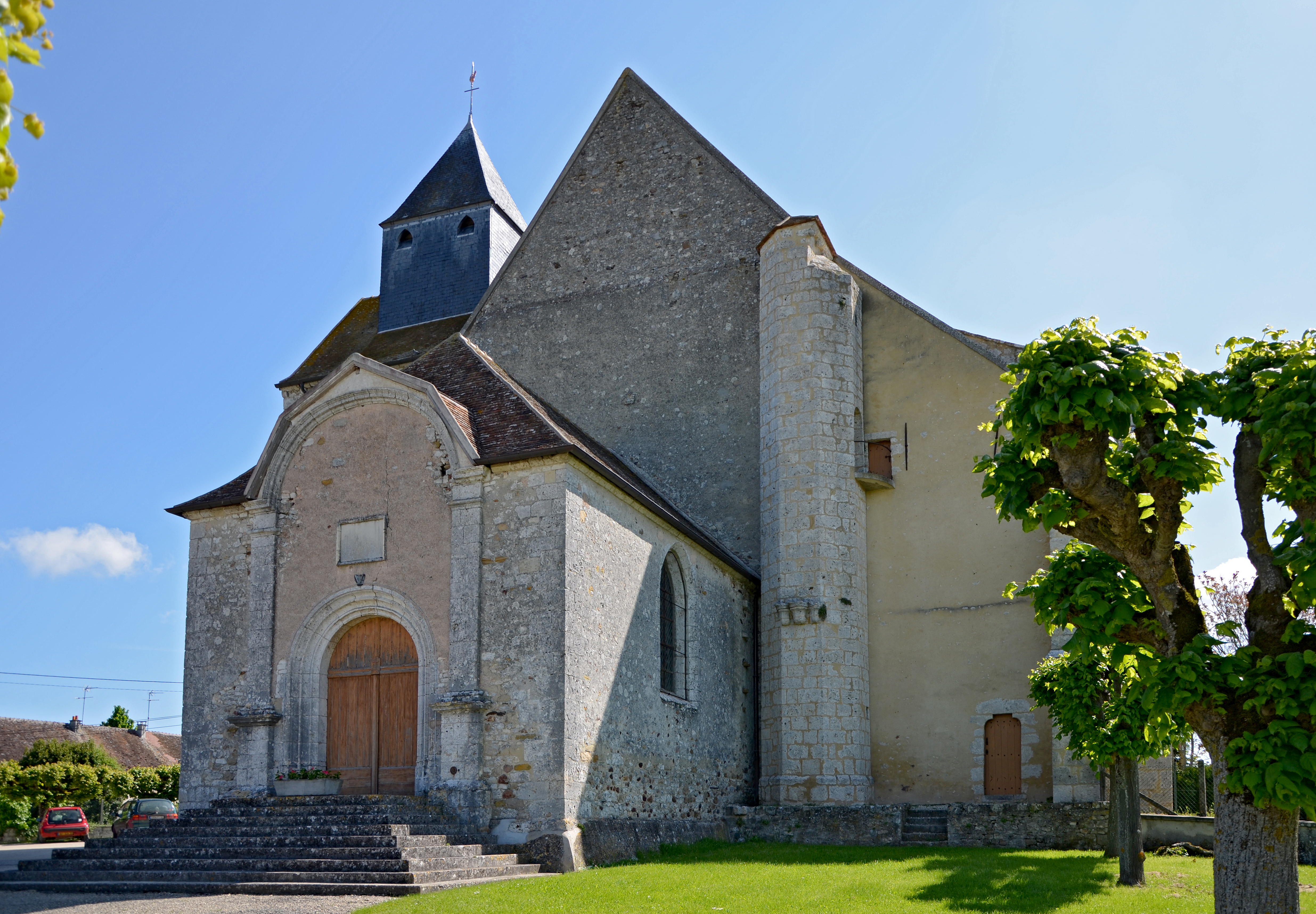 Église de Chalmaison, Seine et Marne, France .